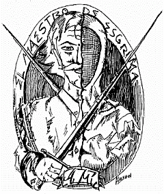 Jaime de Astarloa